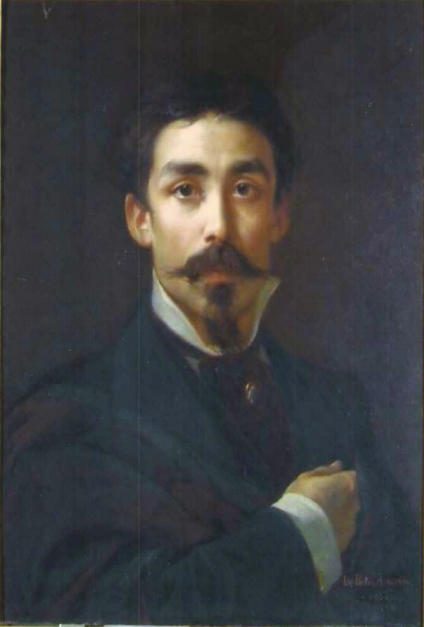 Auto-retrato de Pedro Américo